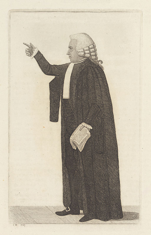 Robert Blair, Lord Avontoun (1741-1811)